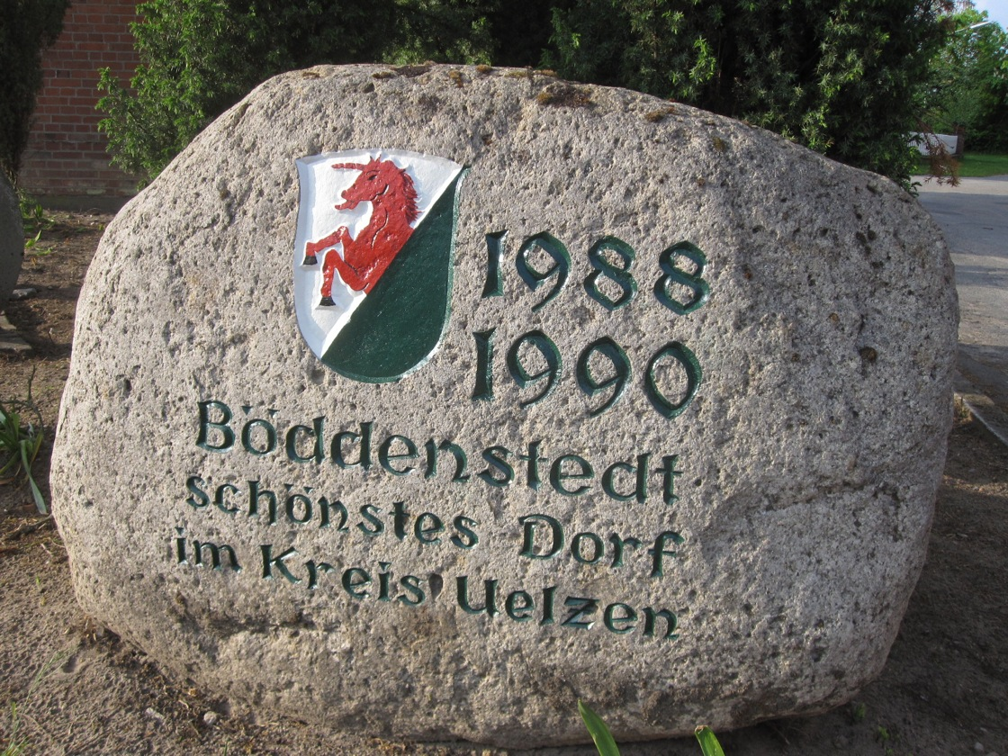 Findling in Böddenstedt mit Wappen und Aufschrift: "1988, 1990 - Böddenstedt, schönstes Dorf im Kreis Uelzen."